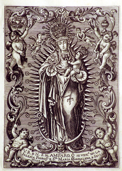 Grabado del siglo XVIII realizada por el grabador José Gabriel de Jesús Díaz en el que se representa a Nuestra Señora del Amparo (Sevilla).